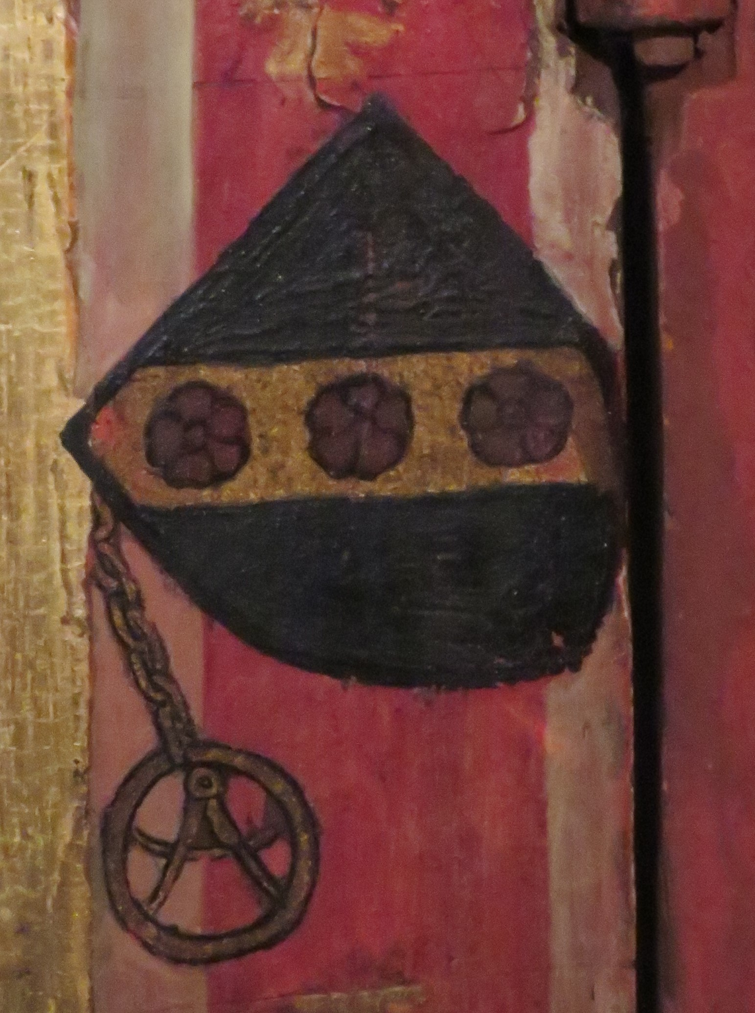 Wappen des Christian von Rentelen am Flügelretabel der Zirkelgesellschaft ("Zirkelbrüderaltar')